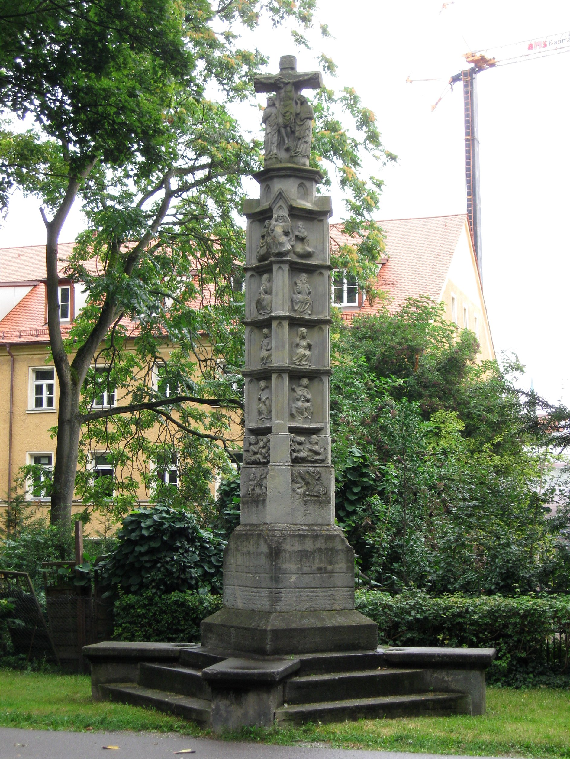 Ernst-Reuter-Platz. Marktsäule bzw. Urteilssäule, "Predigtsäule" beim Peterstor, vierseitiger Pfeiler mit gefasten Kanten und Reliefs des Jüngsten Gerichts, auf der Spitze Kreuzigungsgruppe (Kopie), Kalkstein, frühes 14. Jh., um 1420/30 weitgehend erneuert, Restaurierungen 1526 und 1858, auf kreuzförmigem Stufensockel.